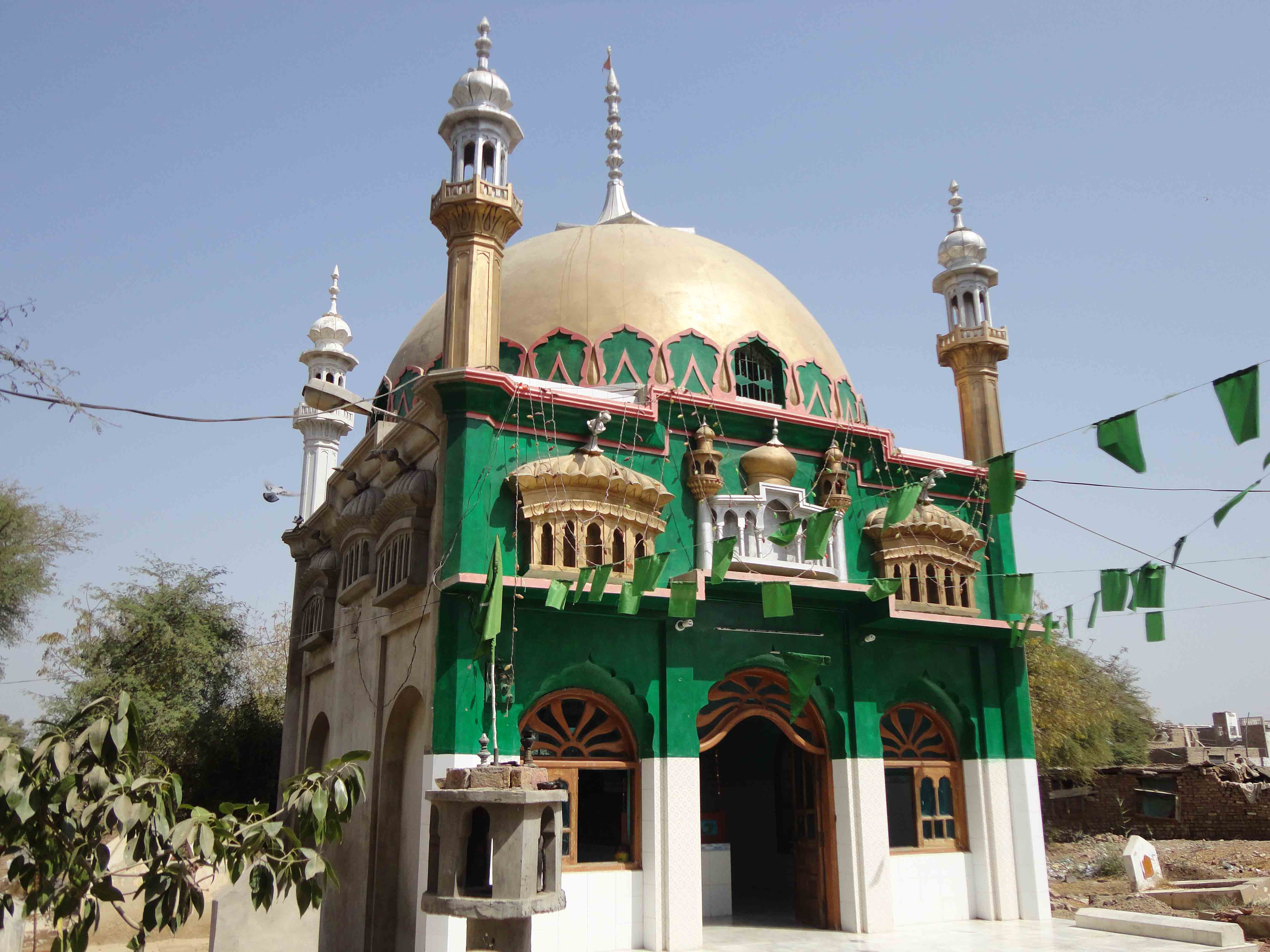 Shāhdādpur, Pakistan